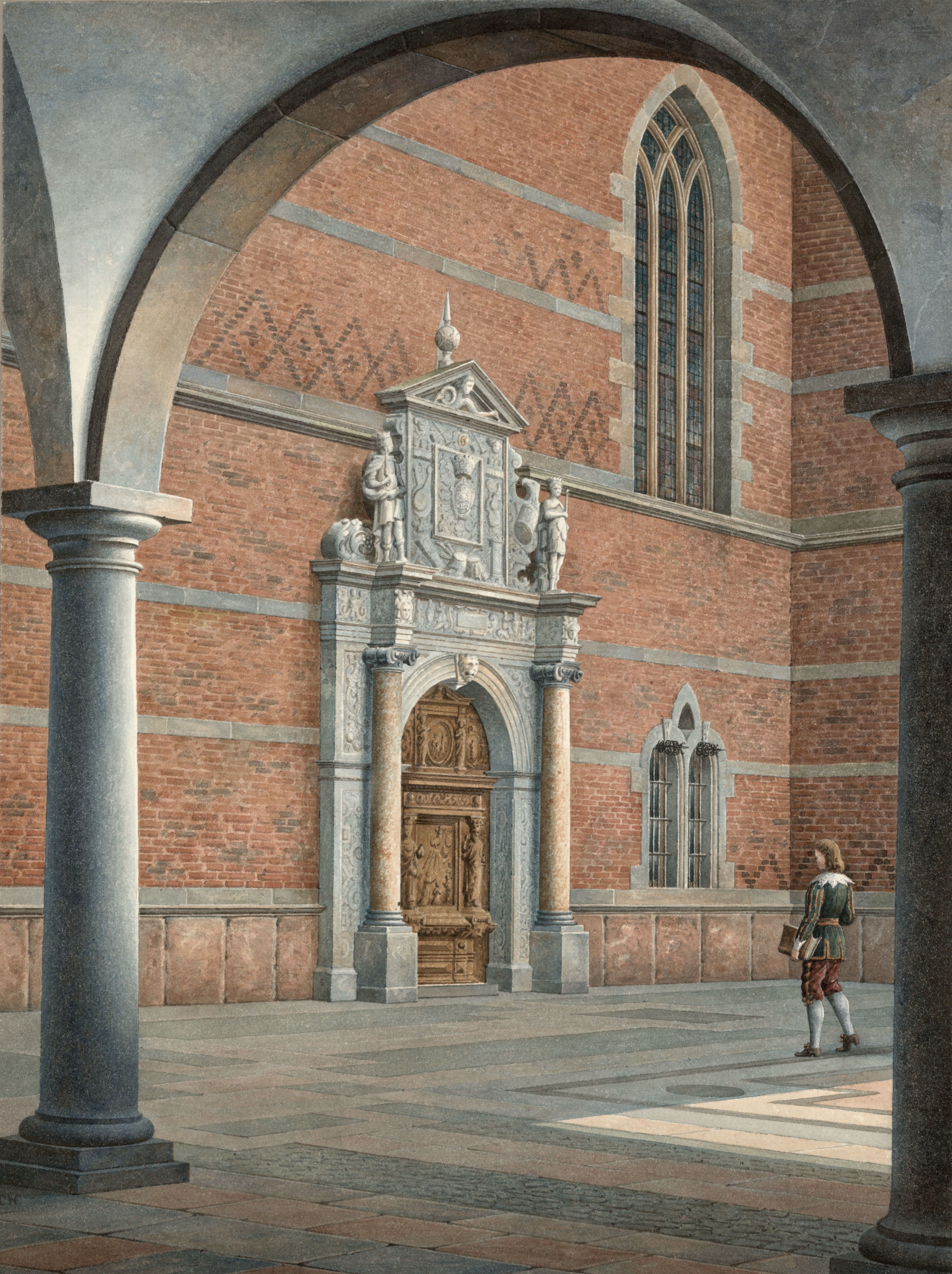 Frederiksborg slot, Lynge-Frederiksborg hrd., Frederiksborg amt